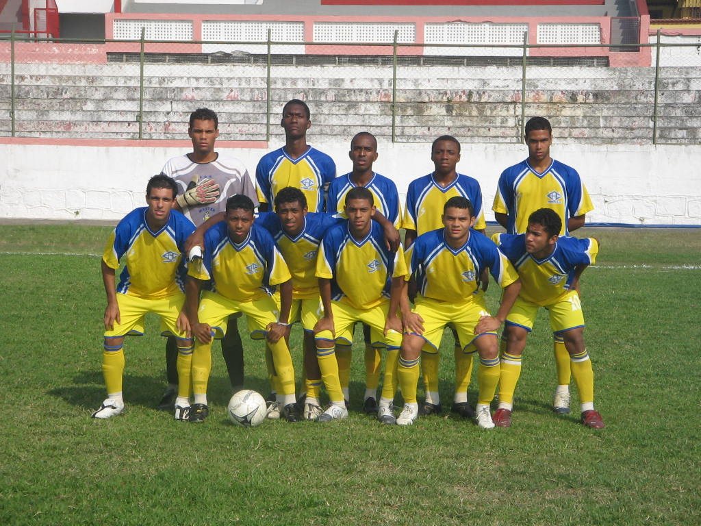 Equipe de Juniores do Everest Atlético Clube, em 2007. Foto de Paulo Roberto Rodrigues